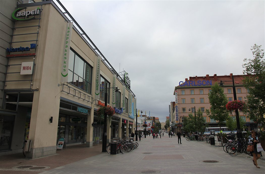 Kauppakatua Kuopion torin kohdalla, näkymä länteen päin.